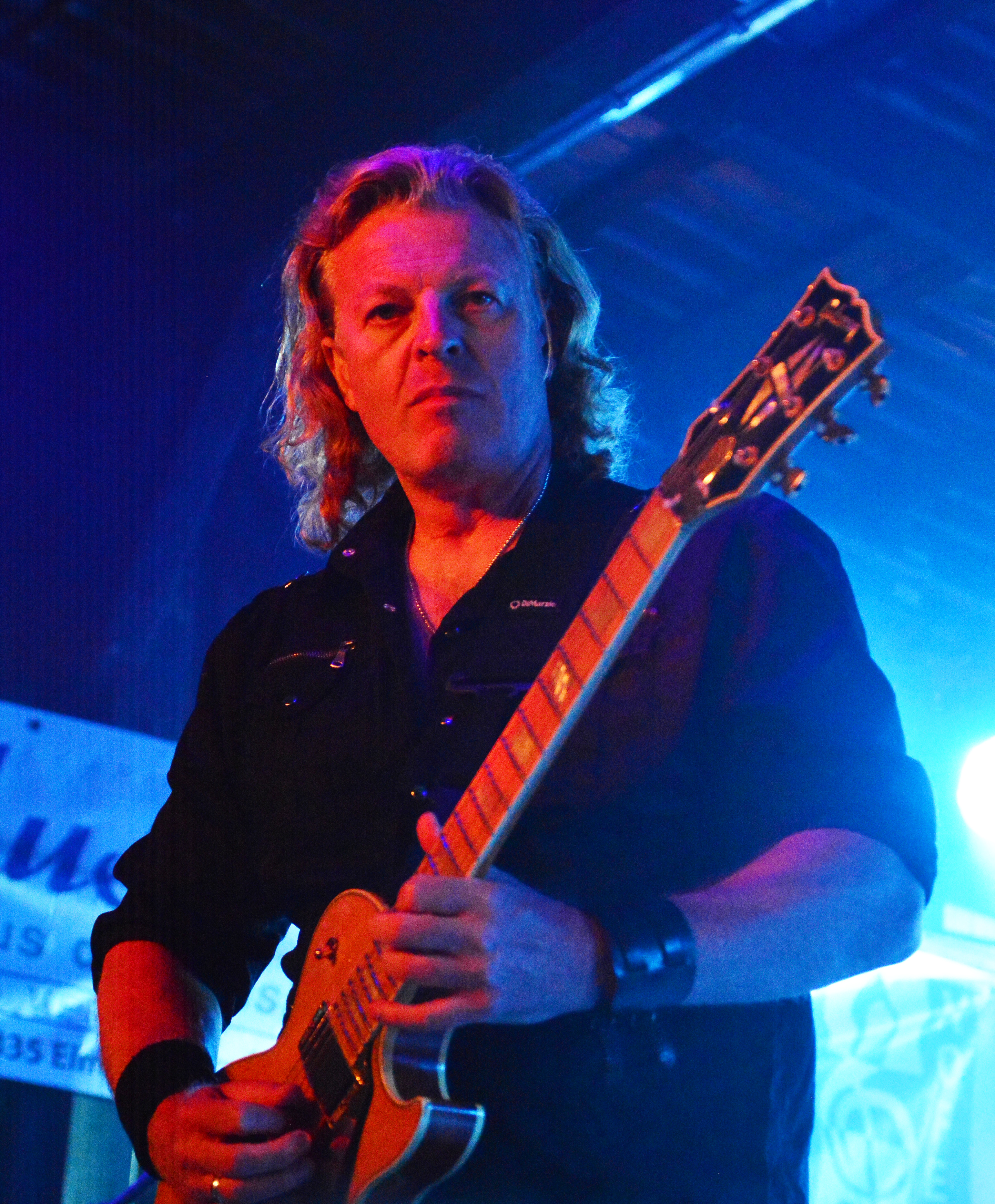 Masterplan beim Headbangers Open Air 2015